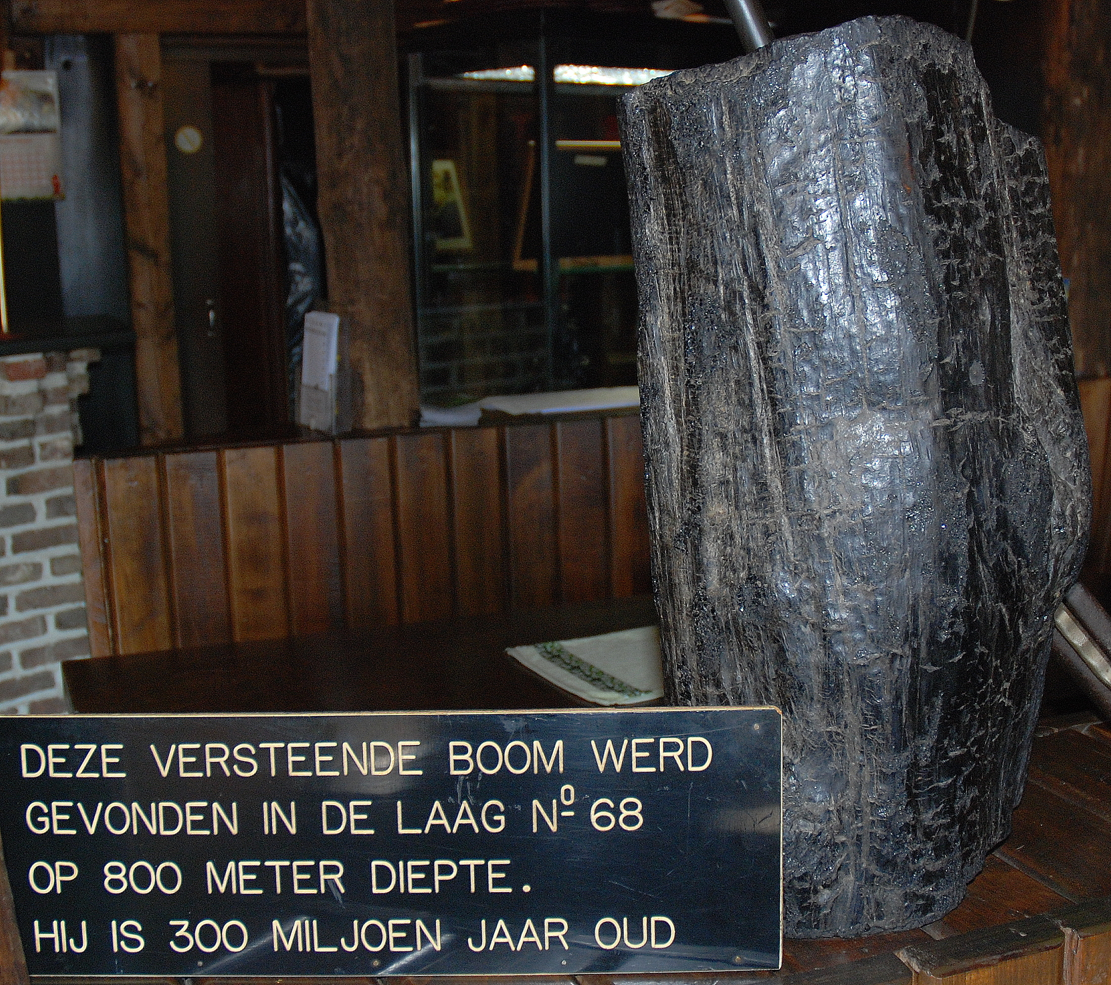 Een versteende boom van 300 miljoen jaar oud, gevondenin de steenkoolmijn van Beringen, België